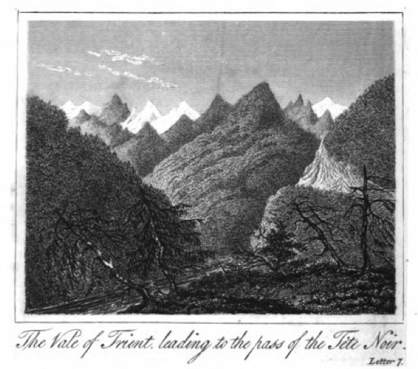 vallée du Trient qui conduit au pas de la Tête Noire (inconnu)